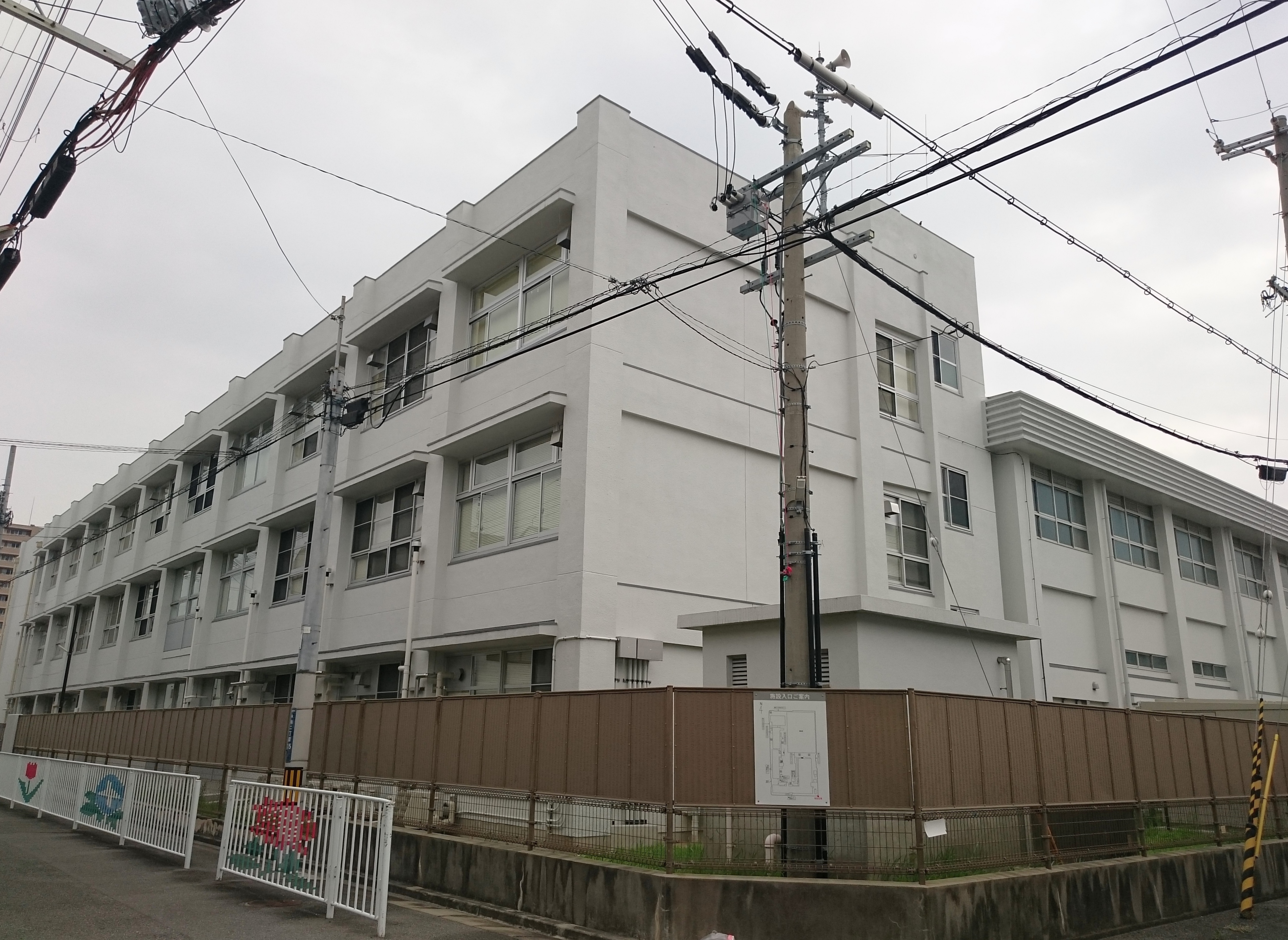 東大阪市立永和小学校の外観 Sony Xperia Z3